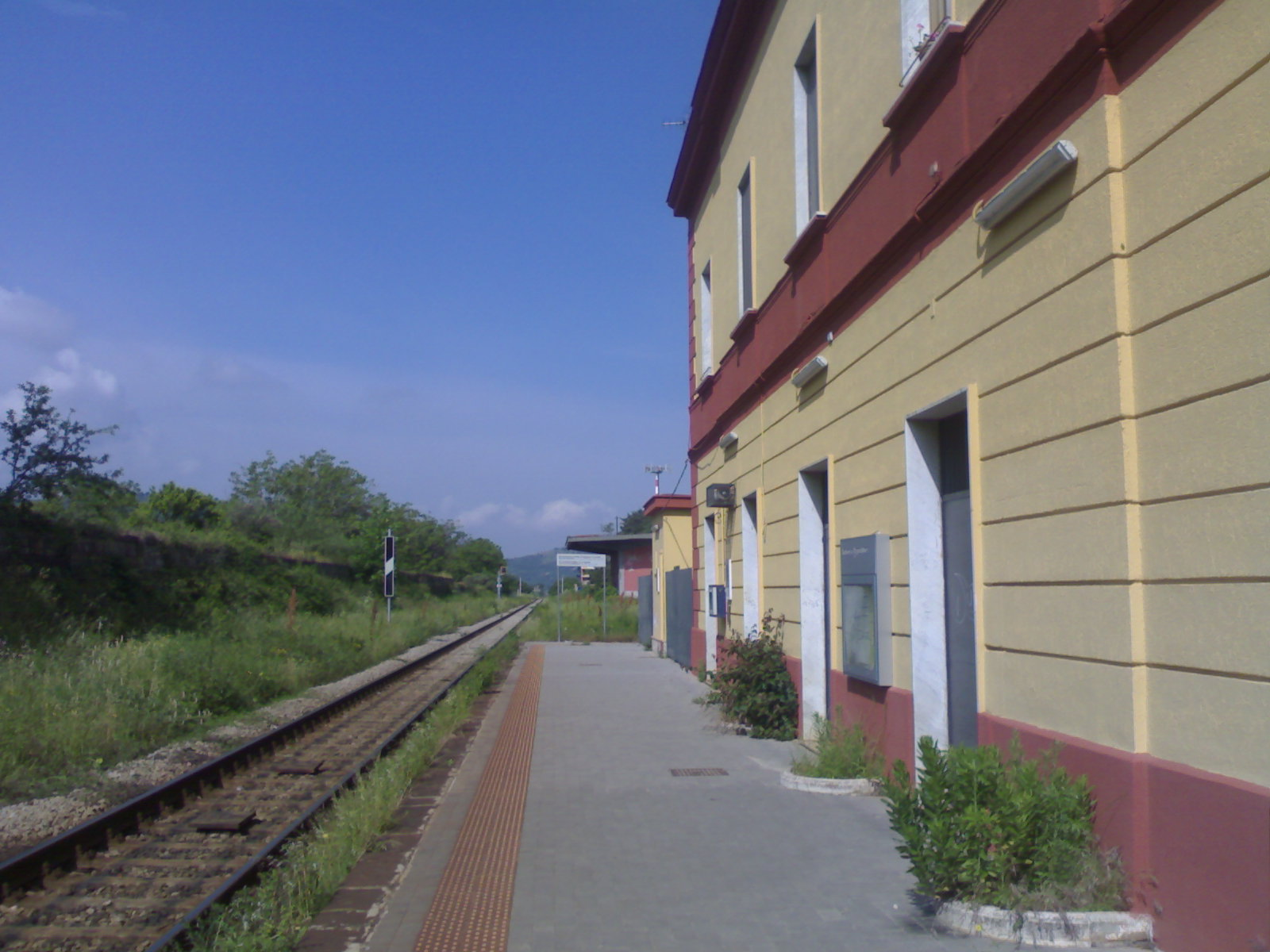 Stazione ferroviaria di castel San Giorgio-Roccapiemonte